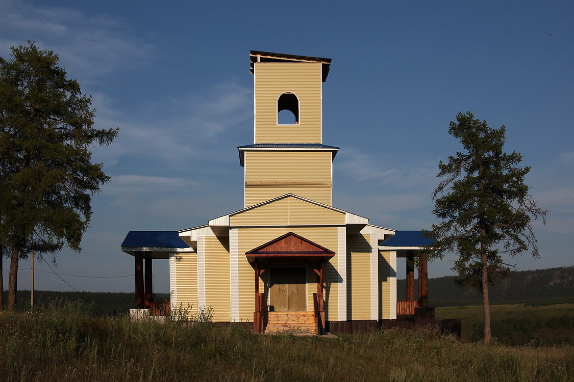 Это самая старая постройка на территории Белорецкого района.